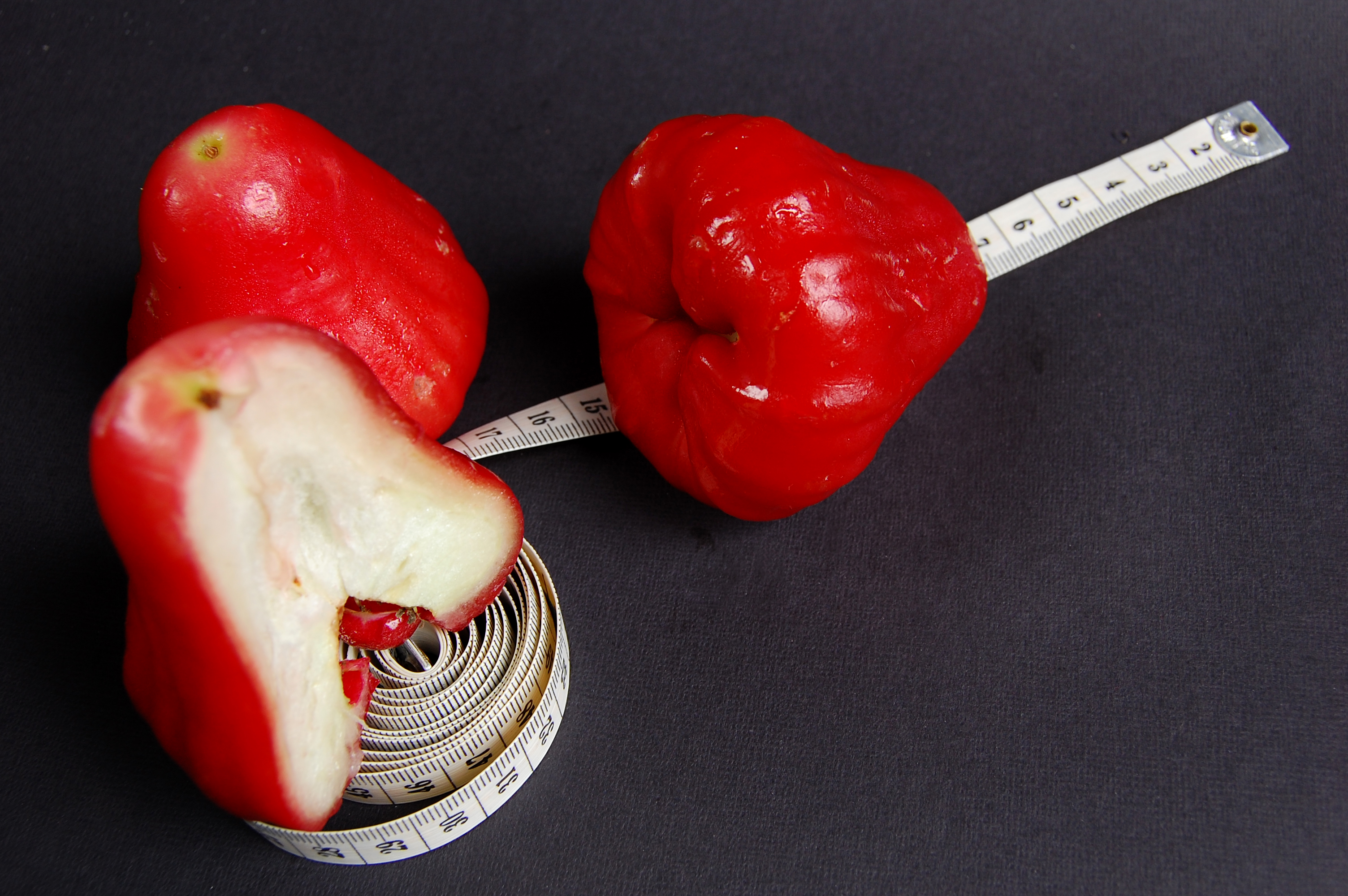 Jambu Air (Bahasa Indonesia)- Syzygium aqueum